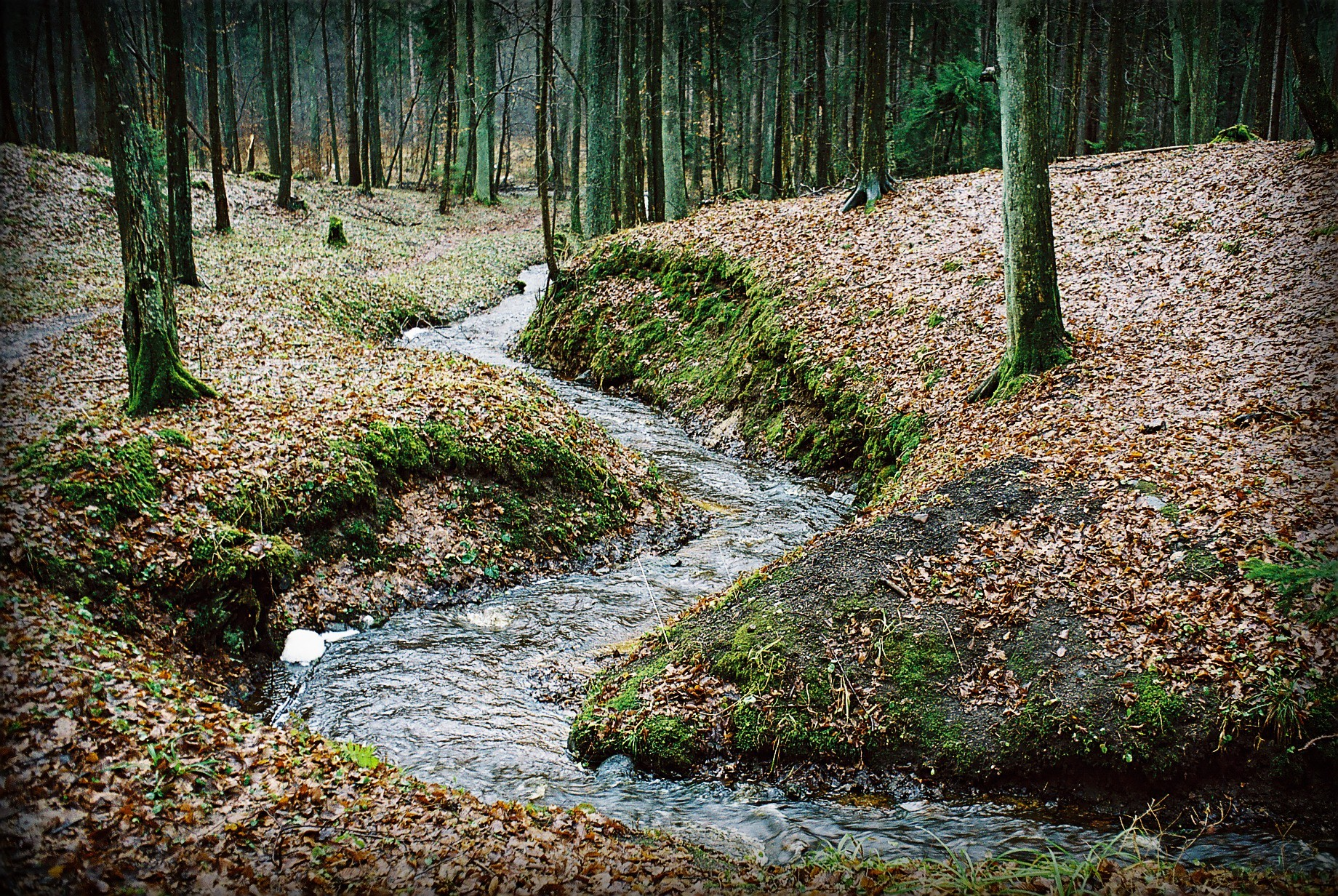 Autor: Adrian Grzegorz Rok utworzenia: 2005